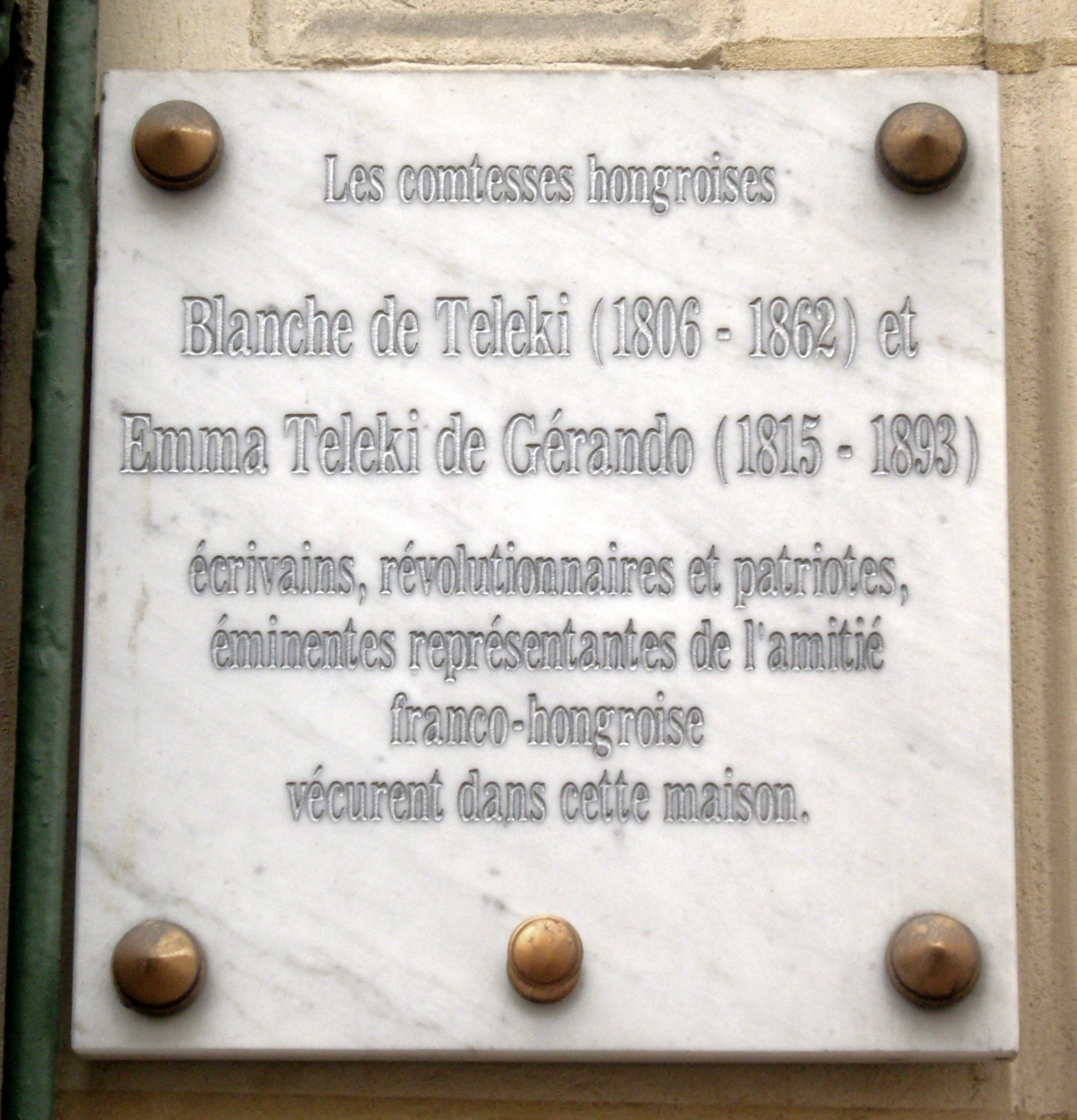 Plaque apposée au n° 37 de la rue de Vaugirard, Paris 6e. « Les comtesses hongroises Blanche de Teleki (1806-1862) et Emma Teleki de Gérando (1815-1893), écrivains, révolutionnaires et patriotes, éminentes représentantes de l'amitié franco-hongroise, vécurent dans cette maison. »